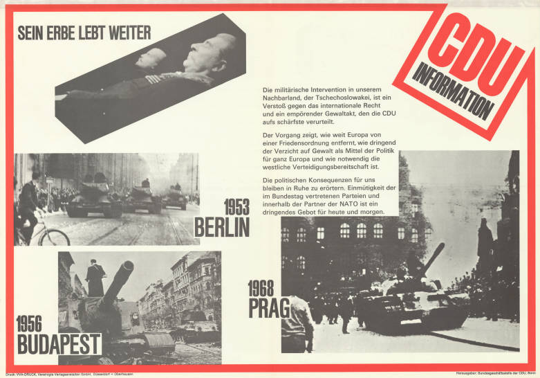 CDU Information Sein Erbe lebt weiter Die militärische Intervention in unserem Nachbarland, der Tschechoslowakei, ist ein Verstoß gegen das internationale Recht und ein empörender Gewaltakt, den die CDU aufs schärfste verurteilt. Der Vorgang zeigt, wie weit Europa von einer Friedensordnung entfernt, wie dringend der Verzicht auf Gewalt als Mittel der Politik für ganz Europa und wie notwendig die westliche Verteidigungsbereitschaft ist. Die politischen Konsequenzen für uns bleiben in Ruhe zu erörtern. Einmütigkeit der im Bundestag vertretenen Parteien und innerhalb der Partner der NATO ist ein dringendes Gebot für heute und morgen. 1953 Berlin 1956 Budapest 1968 PragAbbildung:Leiche Stalins - Straßenkampfszenen mit sowjetischen Panzern (Fotocollage)Plakatart:Motiv-/TextplakatAuftraggeber:Bundesgeschäftsstelle der CDU, BonnDrucker_Druckart_Druckort:VVA-Druck, Vereinigte Verlagsanstalten GmbH, Düsseldorf + OberhausenObjekt-Signatur:10-025 : 9Bestand:Wandzeitungen (10-025)GliederungBestand10-18:CDU-BundesgeschäftsstelleLizenz:KAS/ACDP 10-025 : 9 CC-BY-SA 3.0 DE